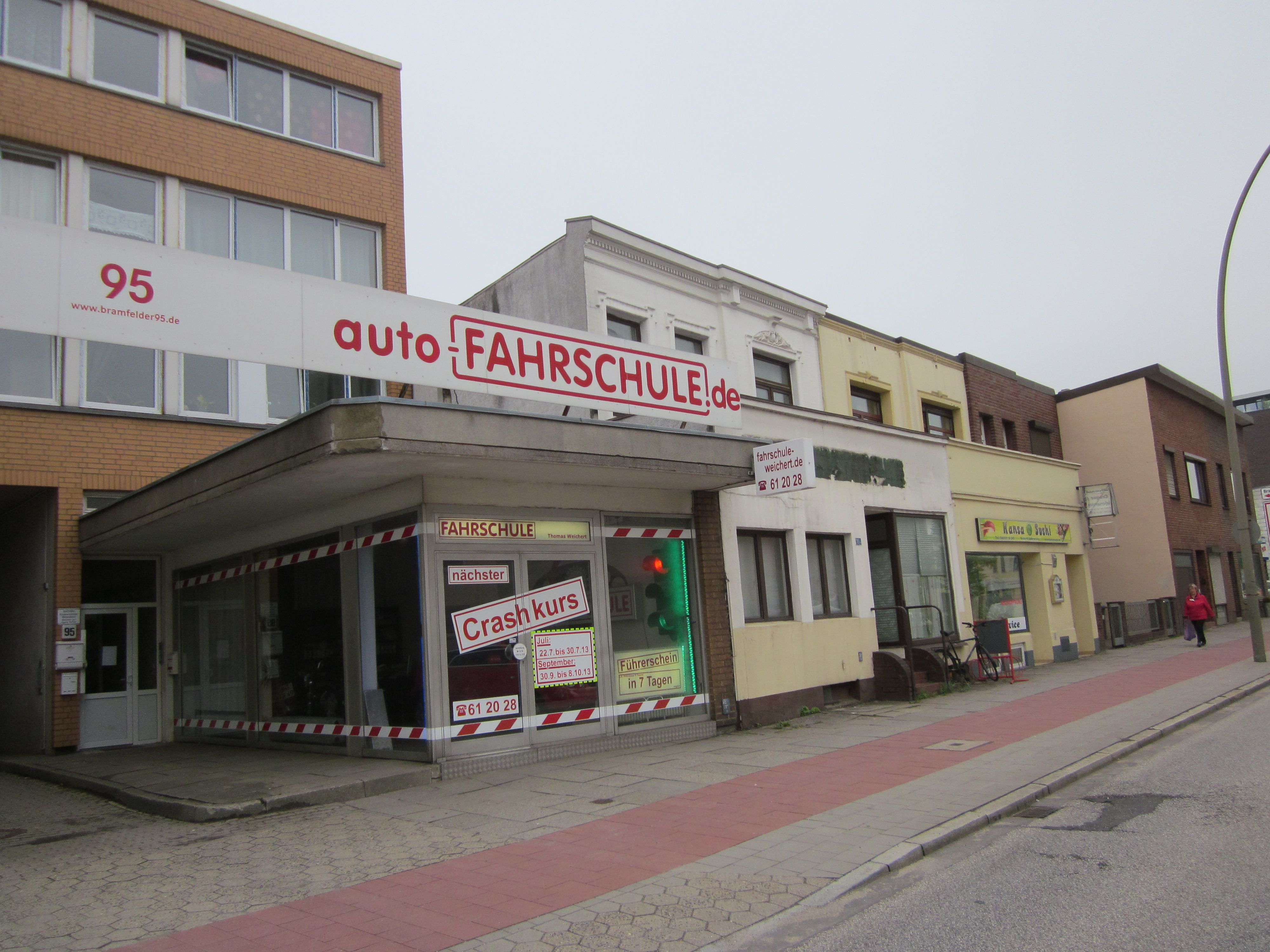 Gewerbebauten an der Westseite der Bramfelder Straße in Barmbek-Nord.